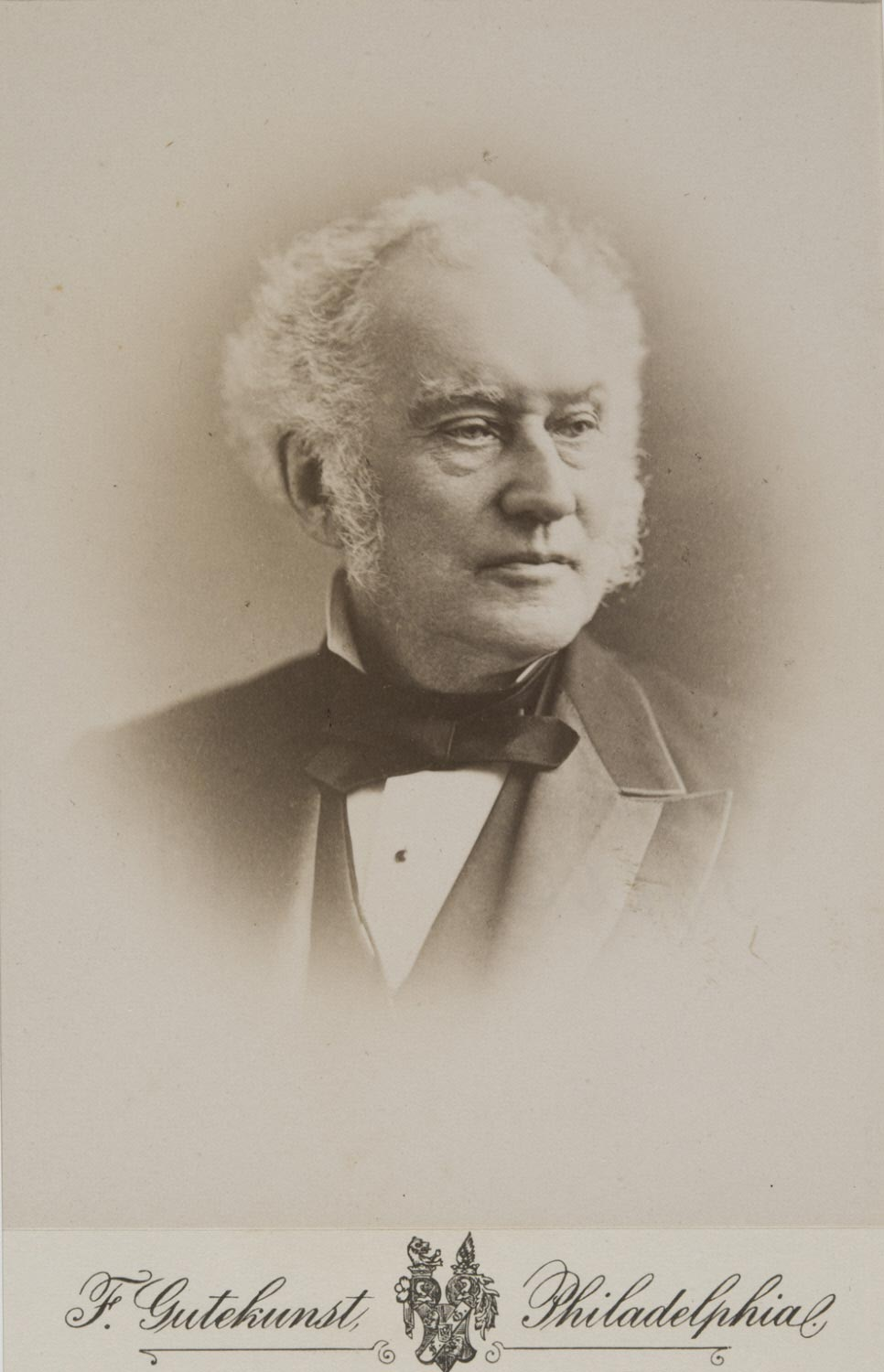 Samuel D. Gross